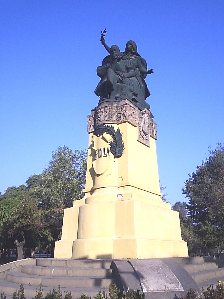 Estatua de Alonso de Ercilla en Santiago de Chile Autor:Alstradiaan Alstradiaan Blog Fecha:Mayo de 2005 Fotografía tomada con una cámara digital Olympus camedia D-395 de 3.2 megapixeles